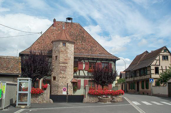 La Mairie de Niedernai